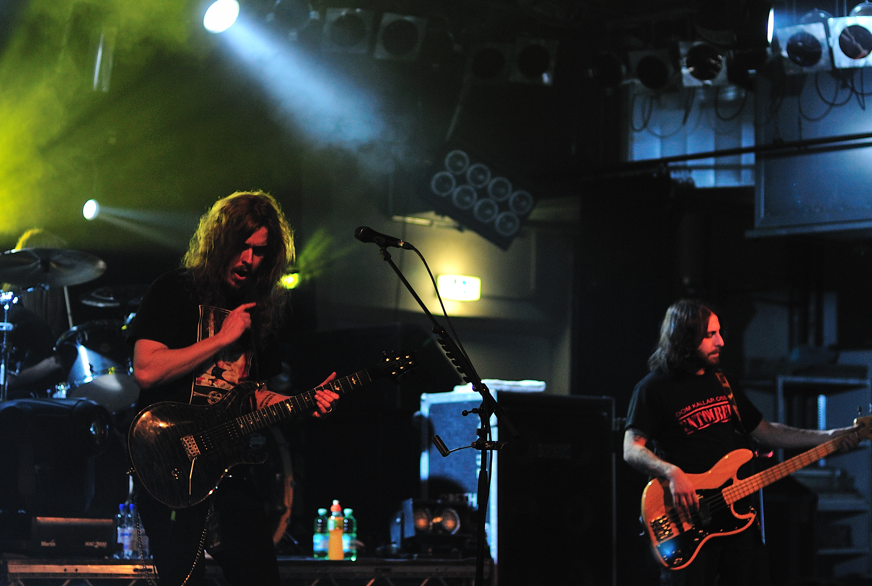 Opeth, Munich Backstage Werk, Saturday 6 December 2008 Mikael Åkerfeldt, Martin Mendez